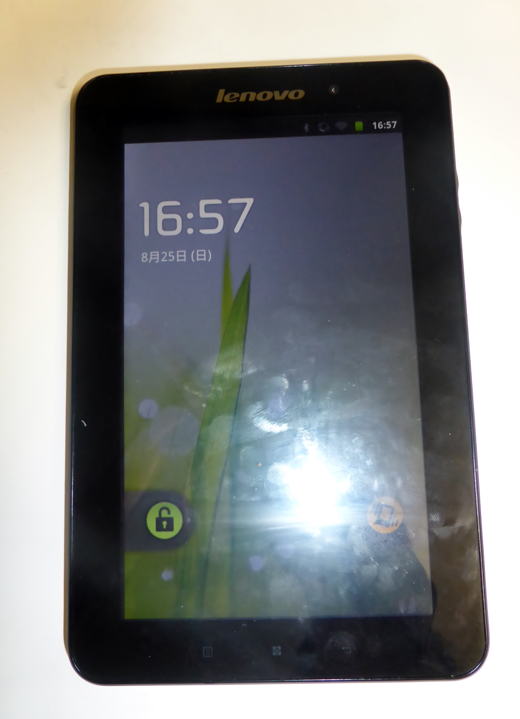 レノボ・ideapad Tabletを撮影